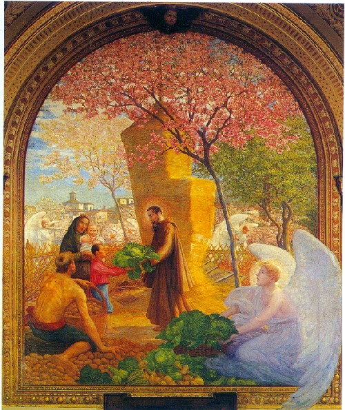 La foto rappresenta l'opera di Fra Paolo - Augusto Mussini descritta nel titolo, conservata nella chiesa dei Cappuccini di Ascoli Piceno.